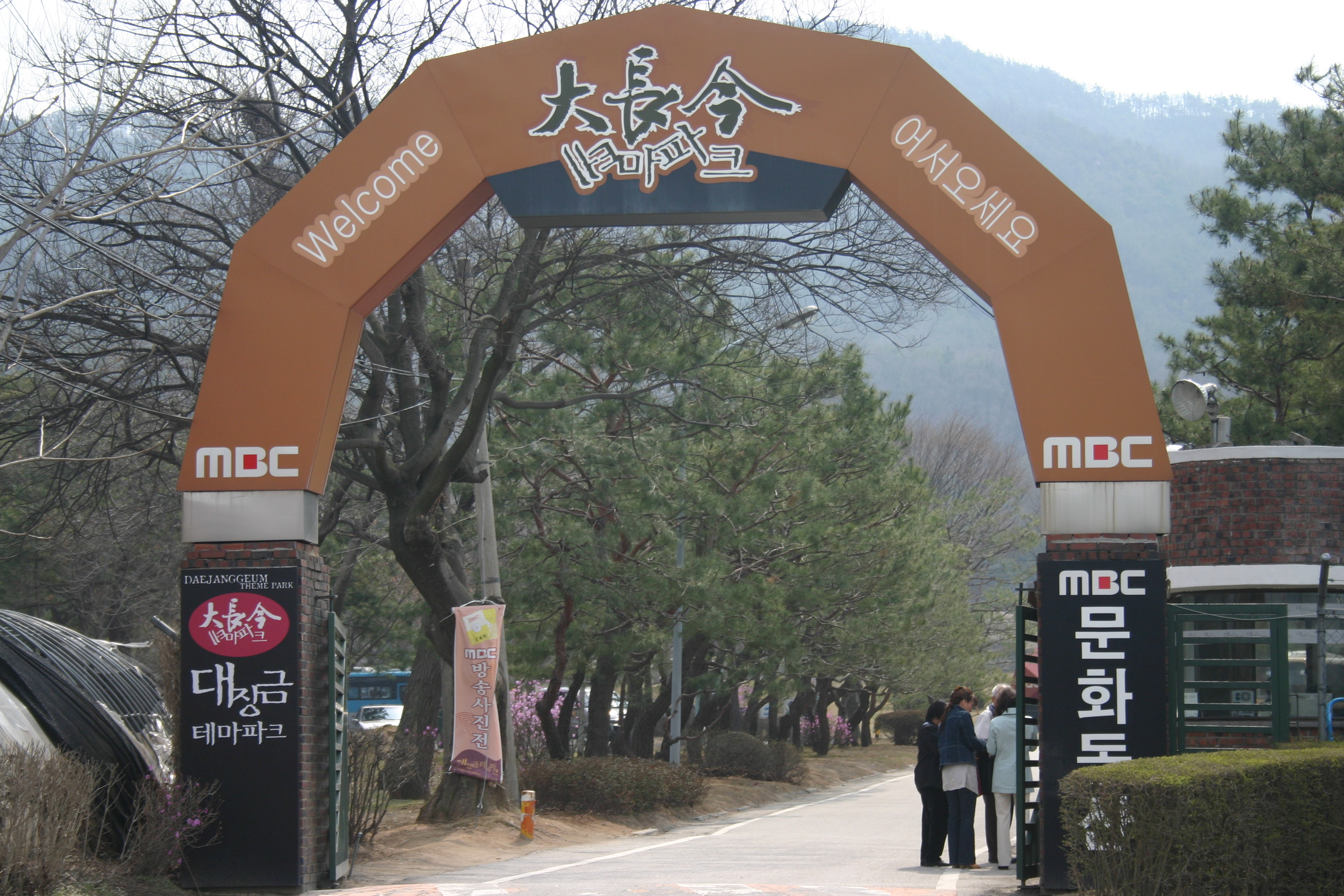 Dae Jang Geum Theme Park